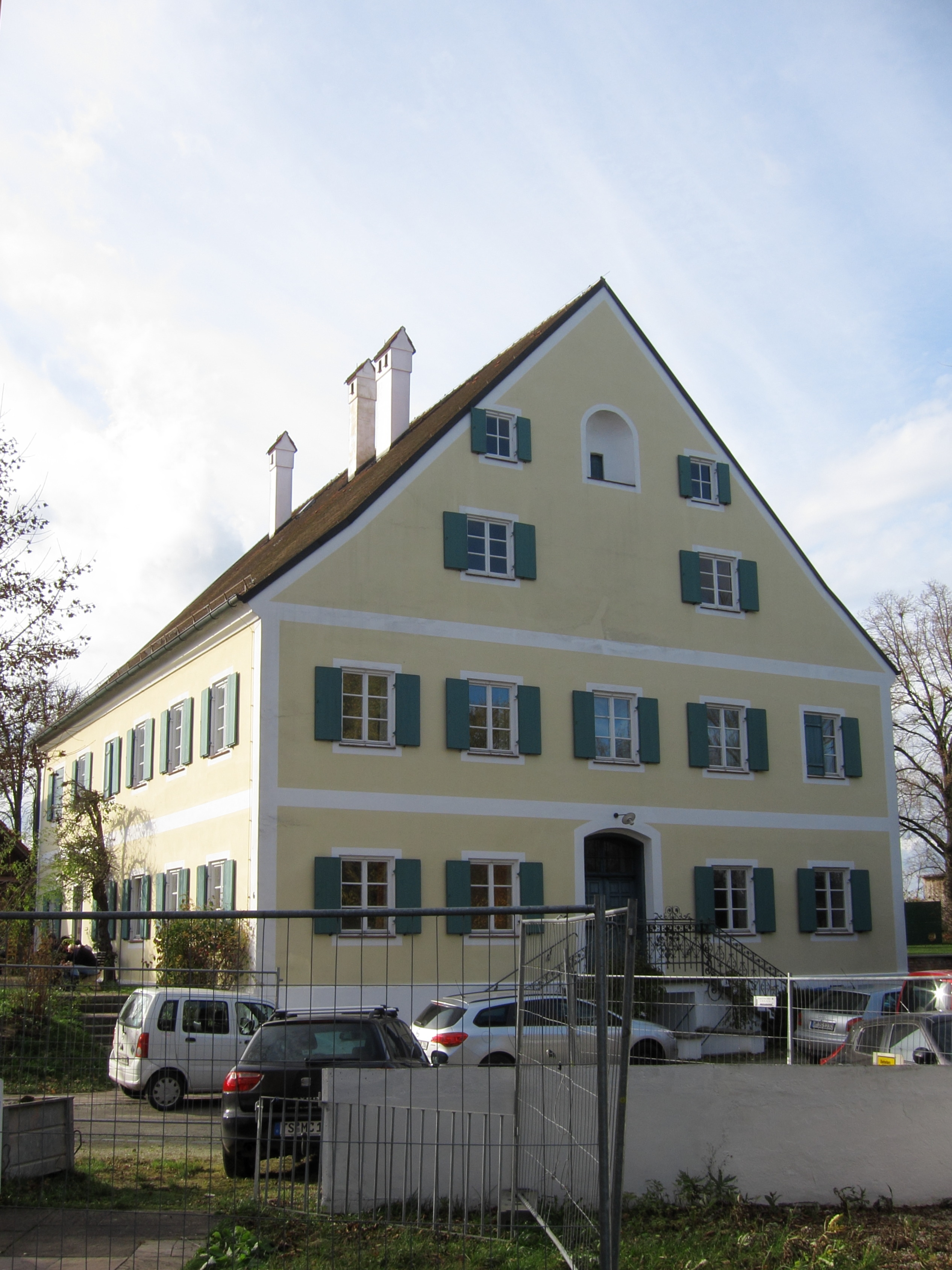 Ehemaliges Pfarrhaus, zweigeschossiger Satteldachbau auf Hochkeller mit zweiläufigem Treppeneingang, erbaut 1719/20, 1801 überarbeitet.